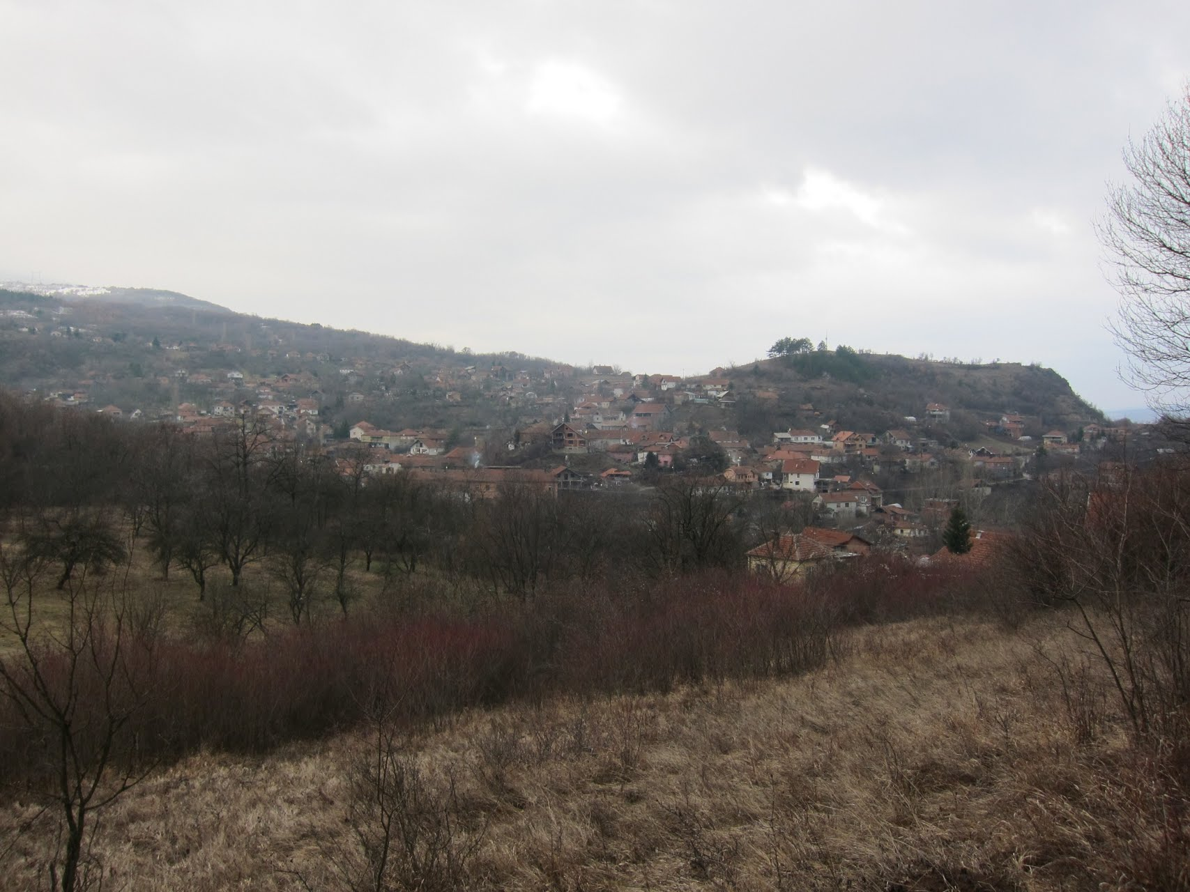 Jelašnica (Leskovac)